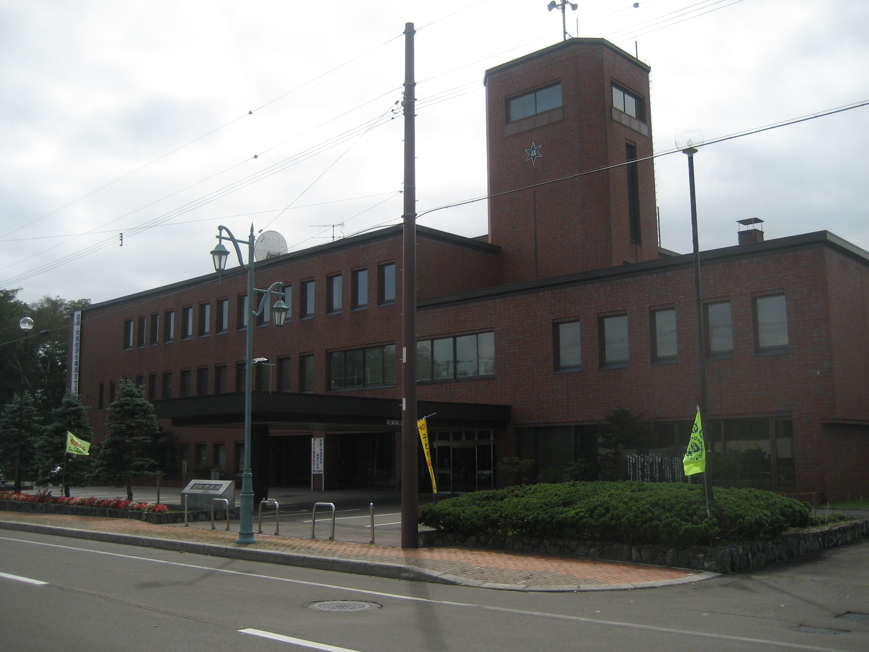 北海道にある清水町役場庁舎